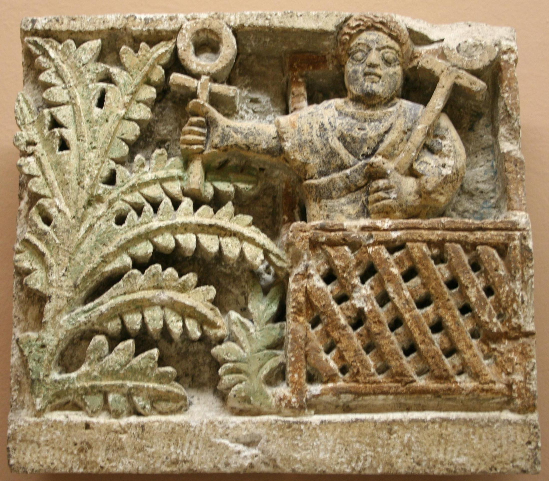 Relieffries, Koptisch, 5. Jh. n. Chr.